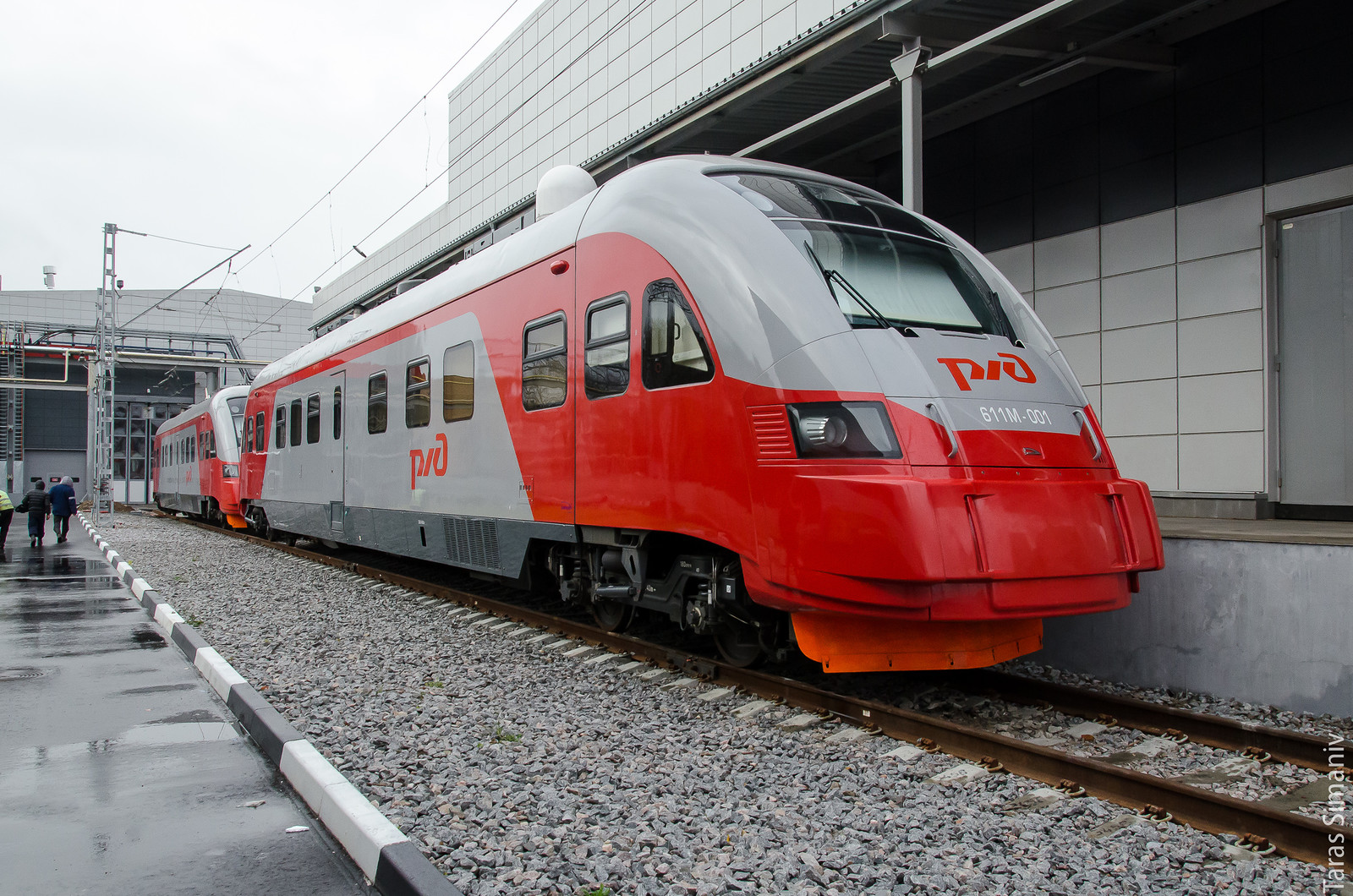 Автомотрисы Pesa 611M-001 и 002, выезд из депо Подмосковная